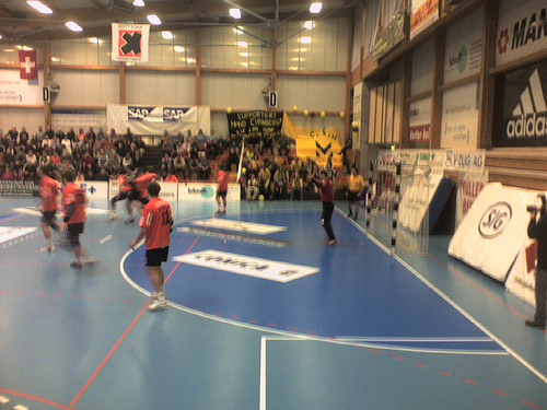 Cupsieger-Cup: Kadetten gegen Chambery Savoie